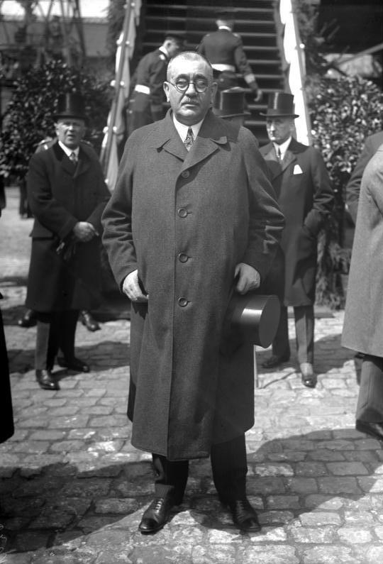 Der Oberpräsident der Provinz Hannover, Gustav Noske, geht in Pension! Deutschlands erster Reichswehrminister der jetzige Oberpräsident der Provinz Hannover Gustav Noske, geht wegen Erreichung der Altersgrenze in den Ruhezustand